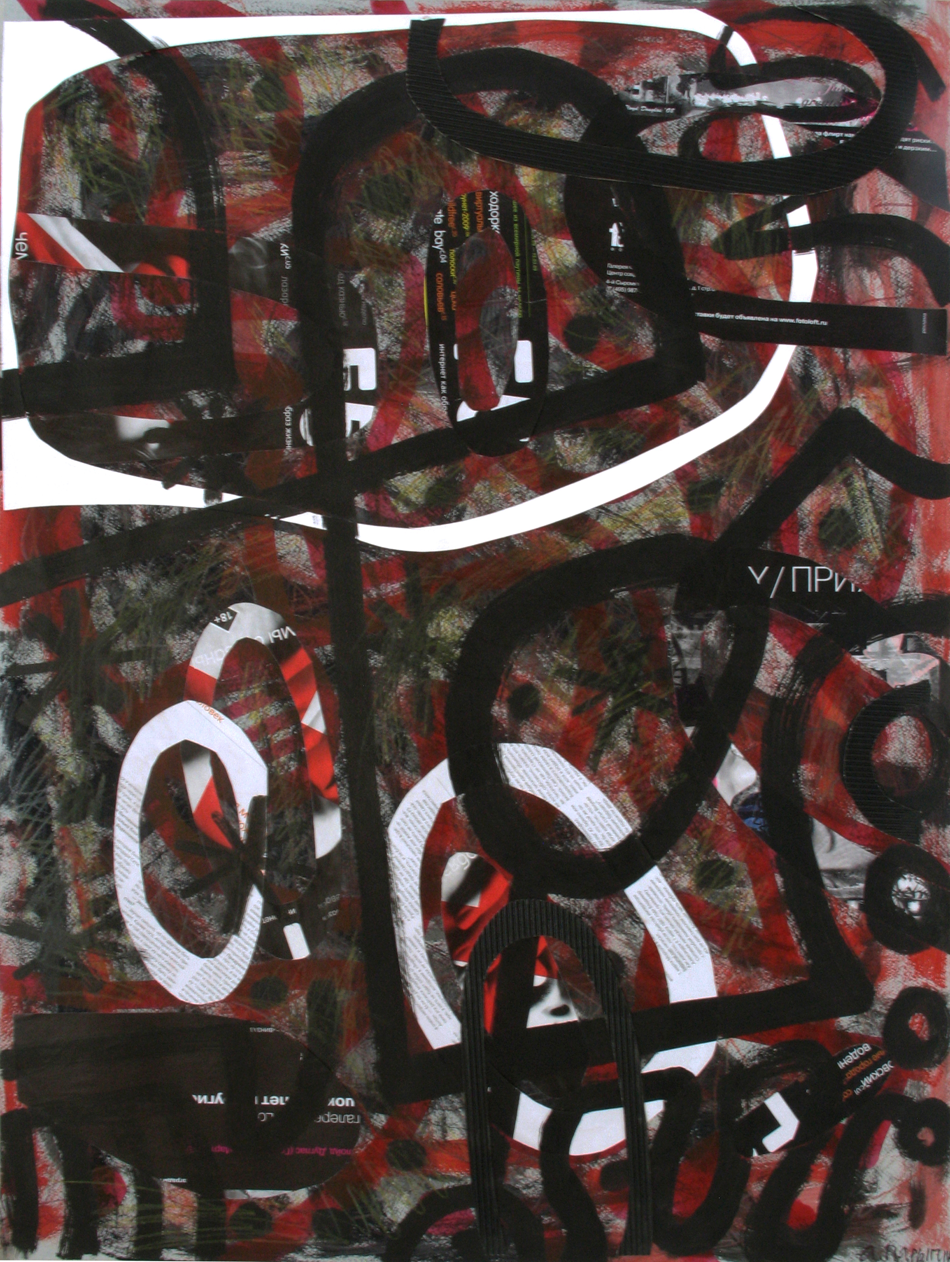 Произведение искусства. Абстрактная графическая работа